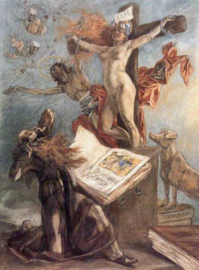 Félicien Rops (1833-1898) Versuchung